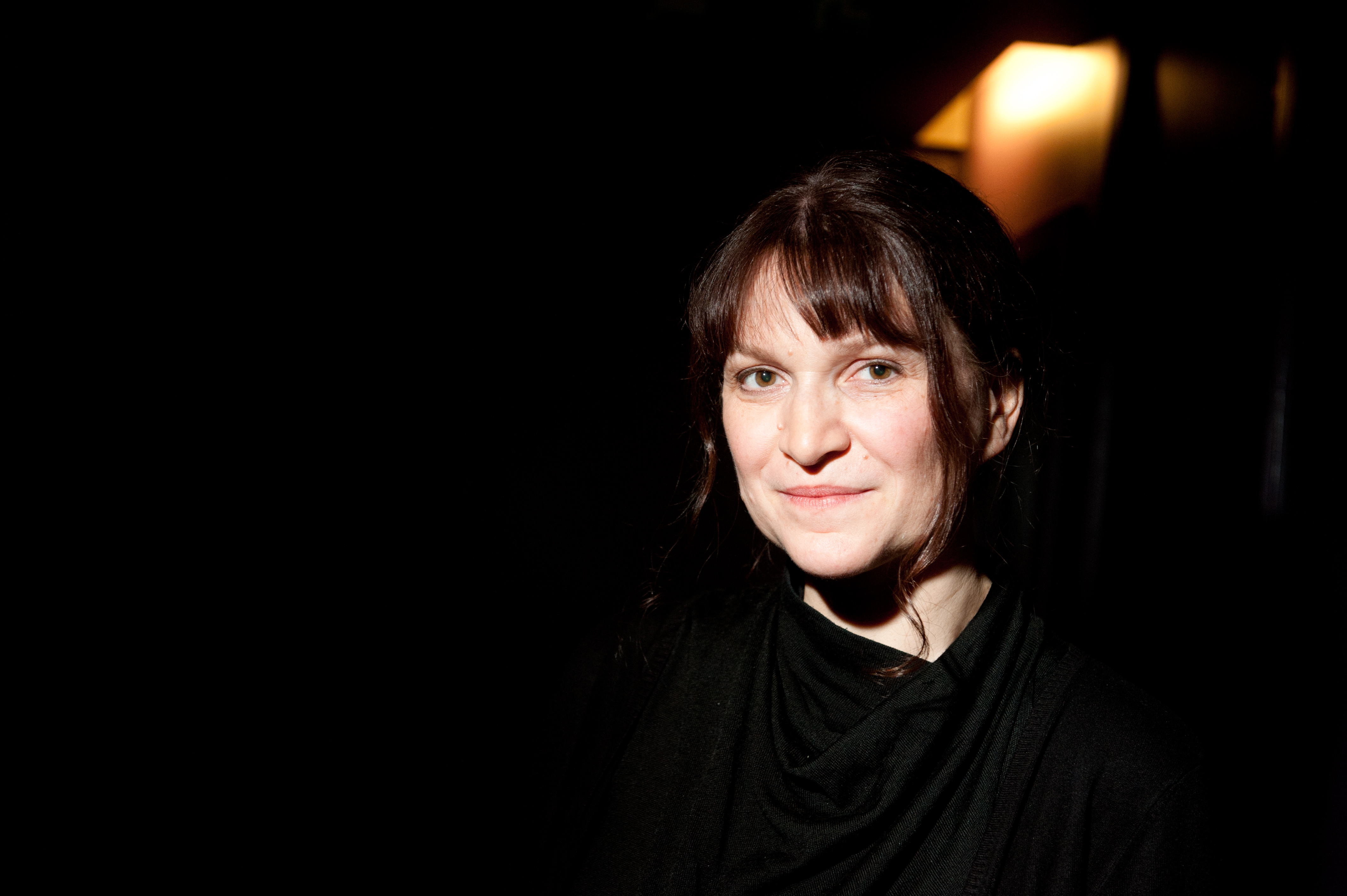 Merethe Lindstrøm, vinnare av Nordiska rådets litteraturpris 2012.